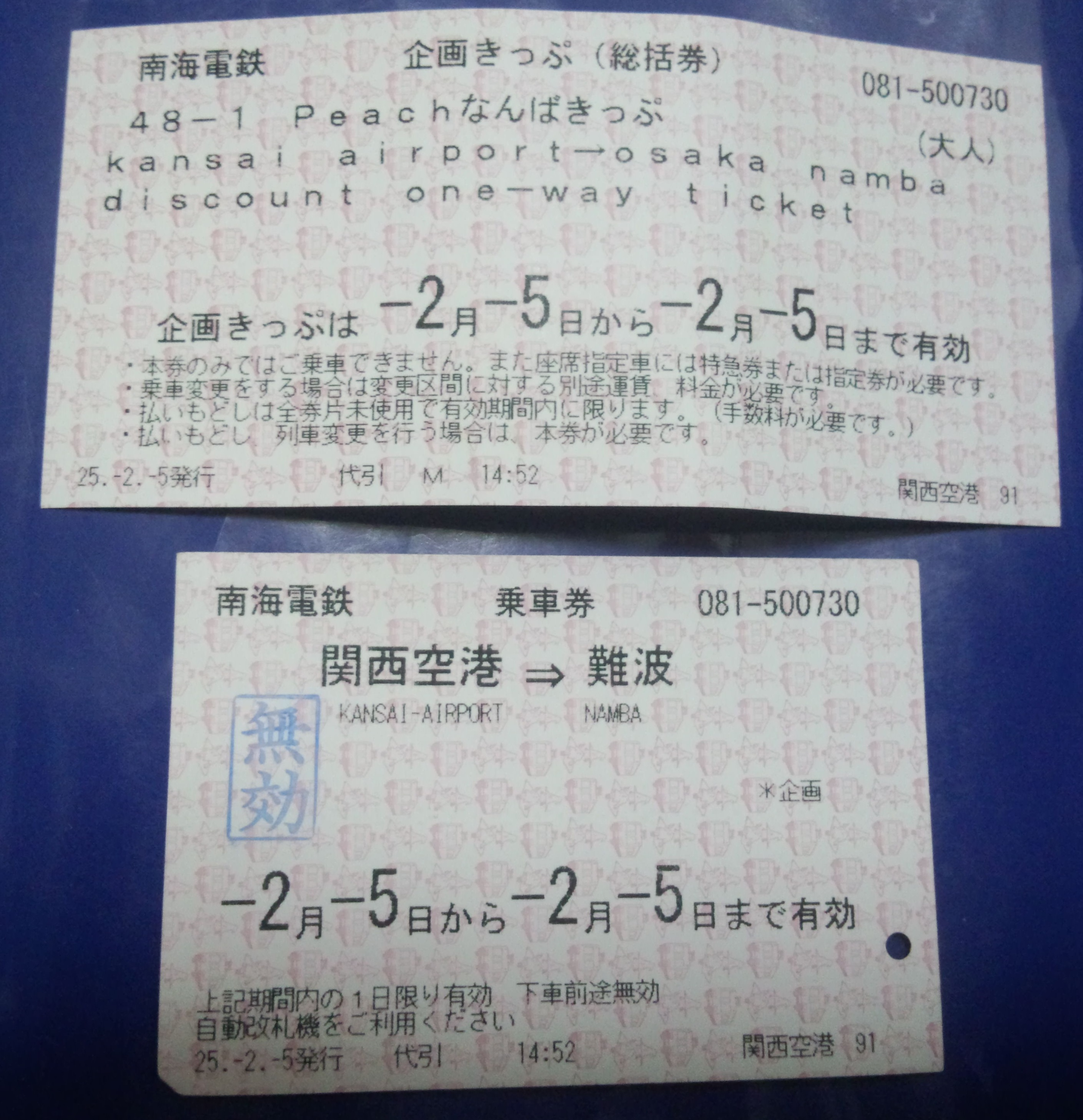 南海電車の関空~なんば間の運賃890円をPEACH航空利用者に対してのみ800円に割引する特別切符。PEACH航空の関空行きの便の機内でのみ販売されている。